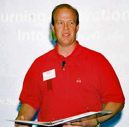 Alan Hudson